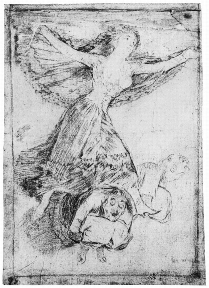 Dibujo preparatorio del capricho nª 61.